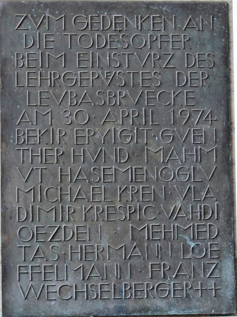 Gedenktafel der Toten beim Einsturz der Leubasbrücke A7 1974